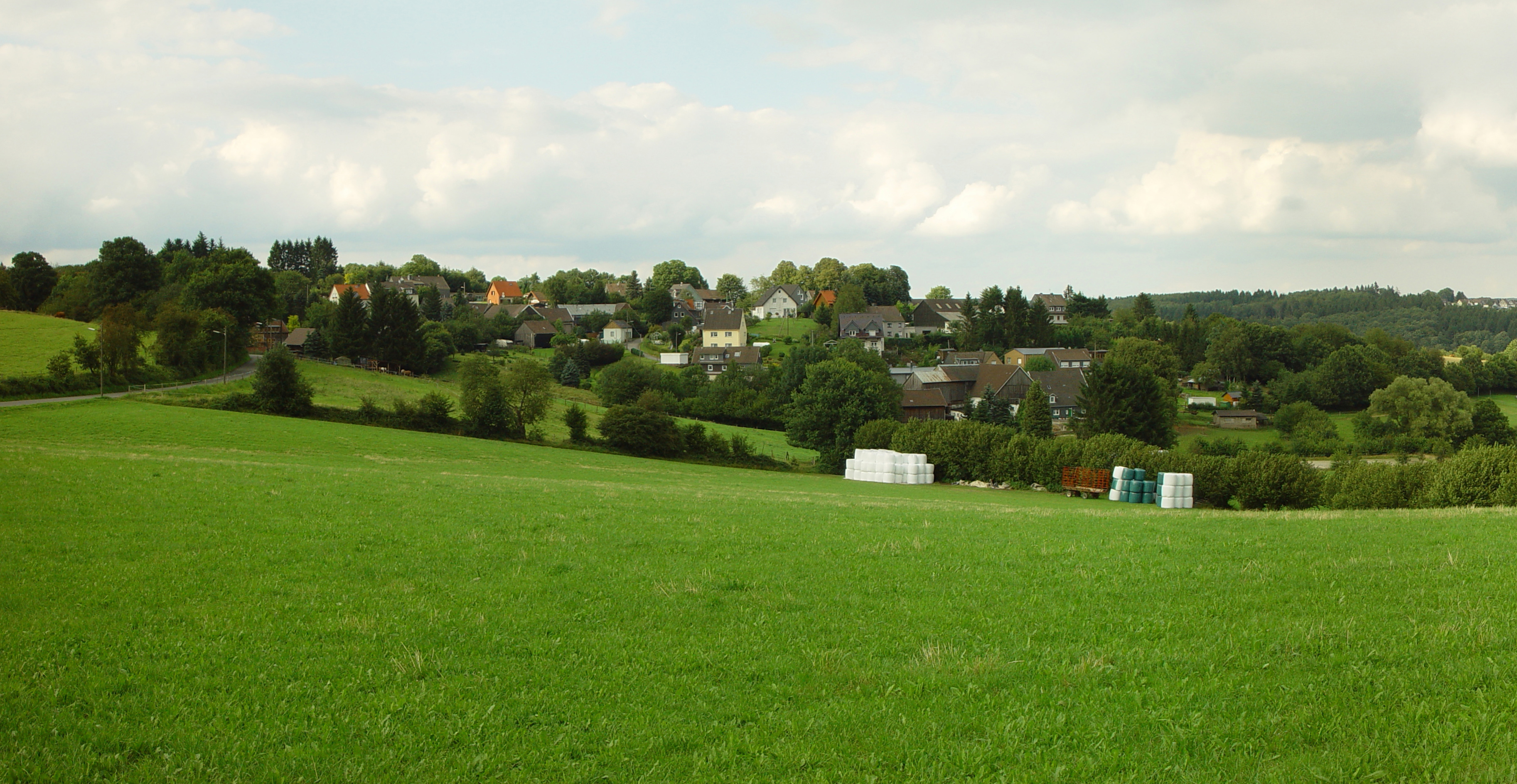 Wuppertal-Herbringhausen